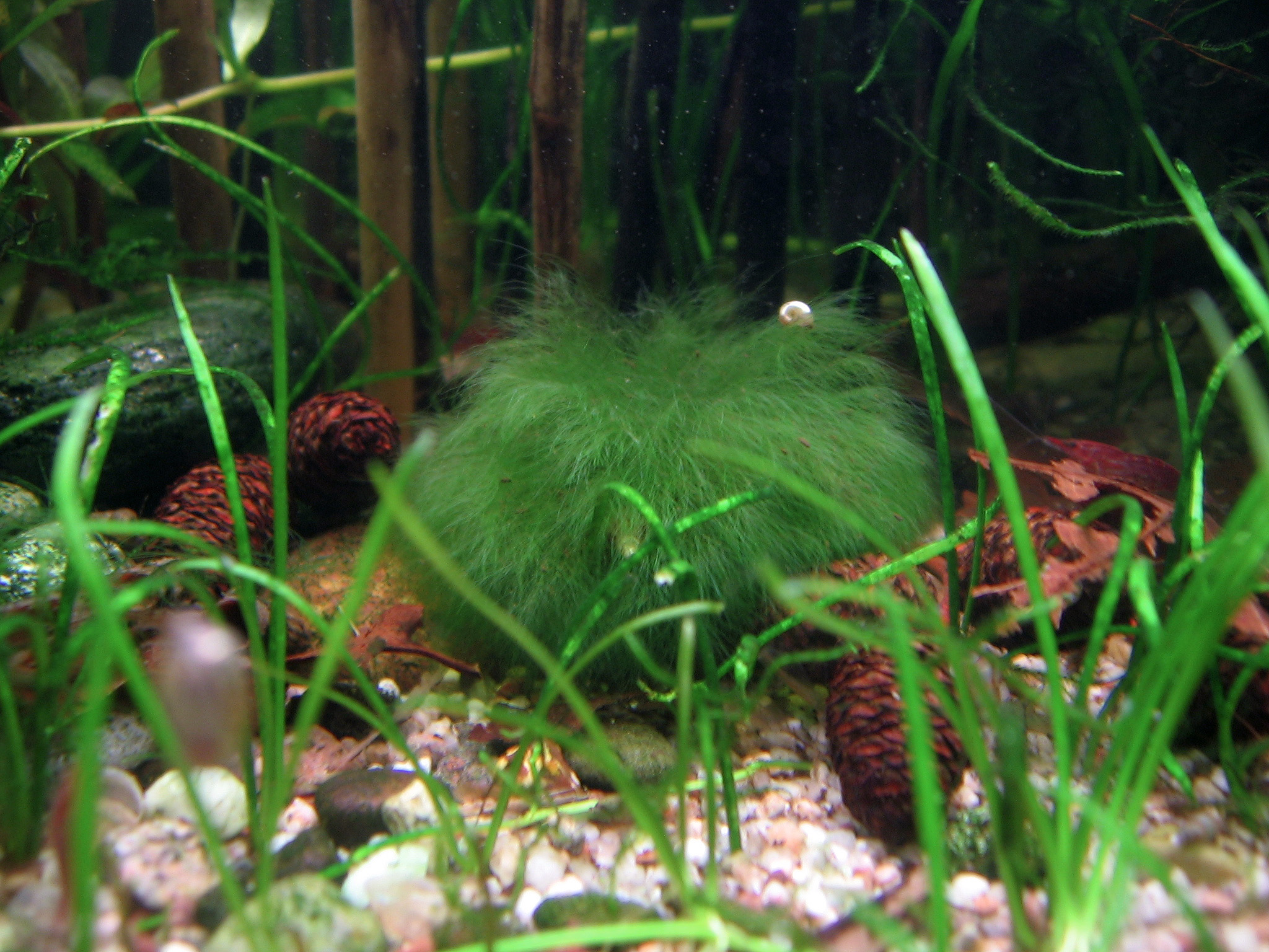 unbekannte Alge